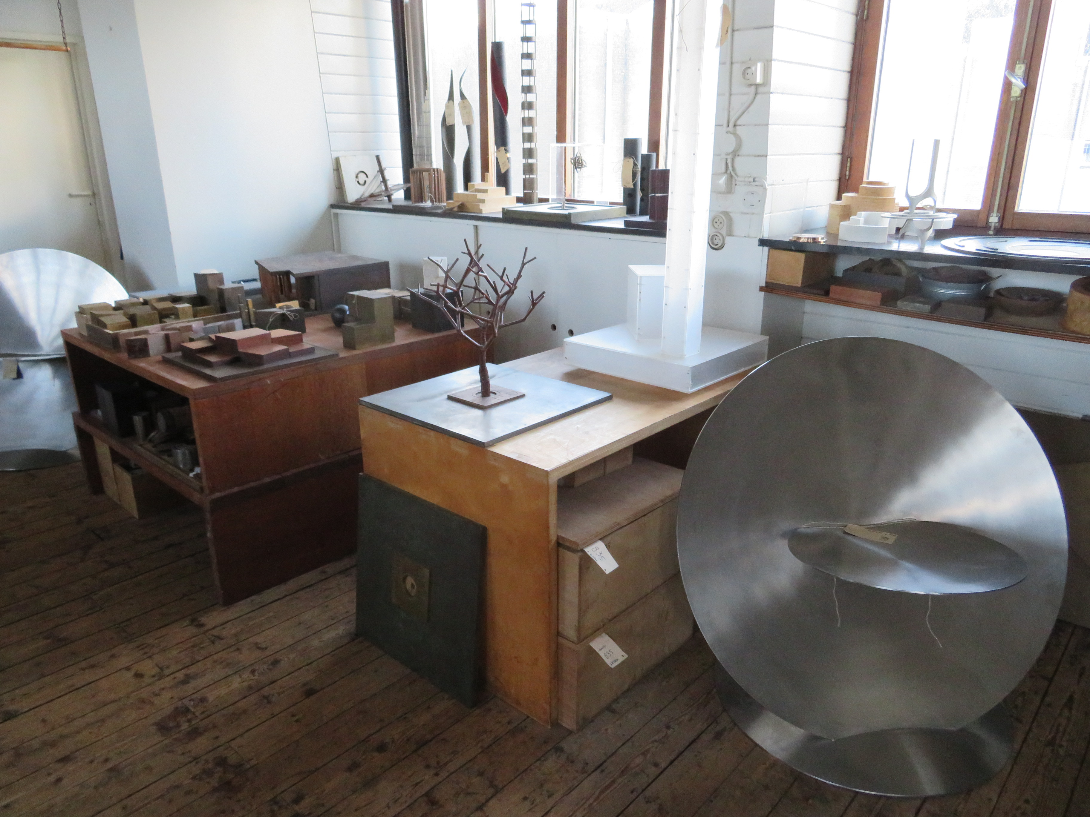 Atelier van André Volten aan de Asterweg in Amsterdam-Noord